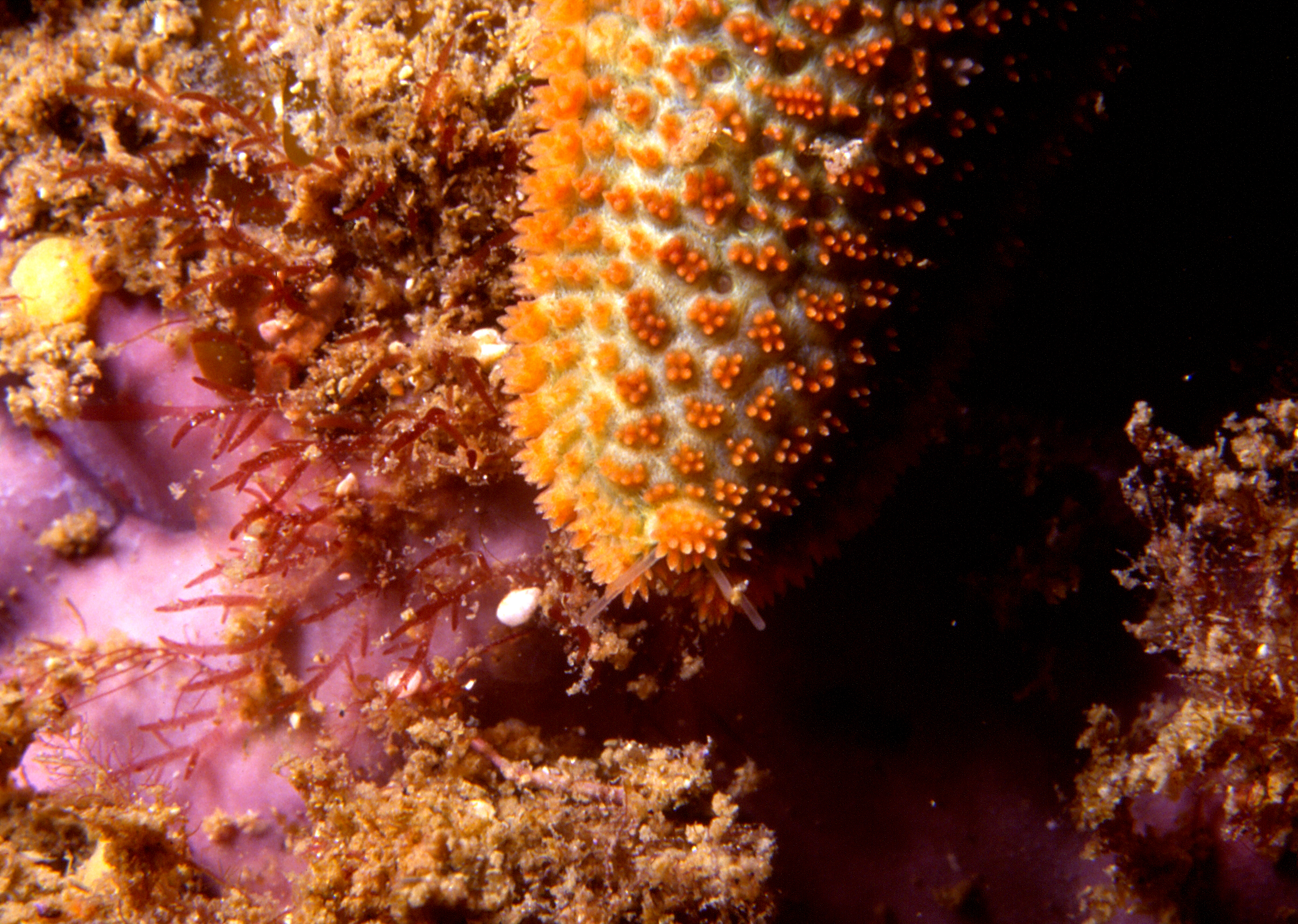 détails d'une extrémité d'un des bras d' Asteria gibbosa où l'on peut distinguer "l' oeil brachail" ou tâche oculaire